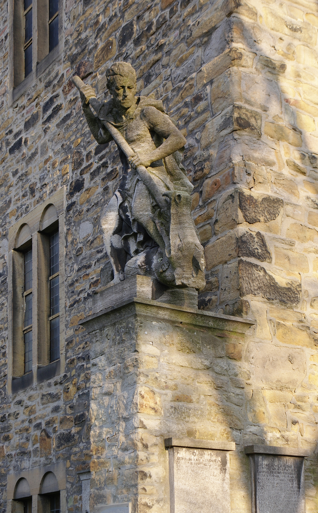 Denkmalgeschützte Kirche St. Georg in Dortmund-Aplerbeck.